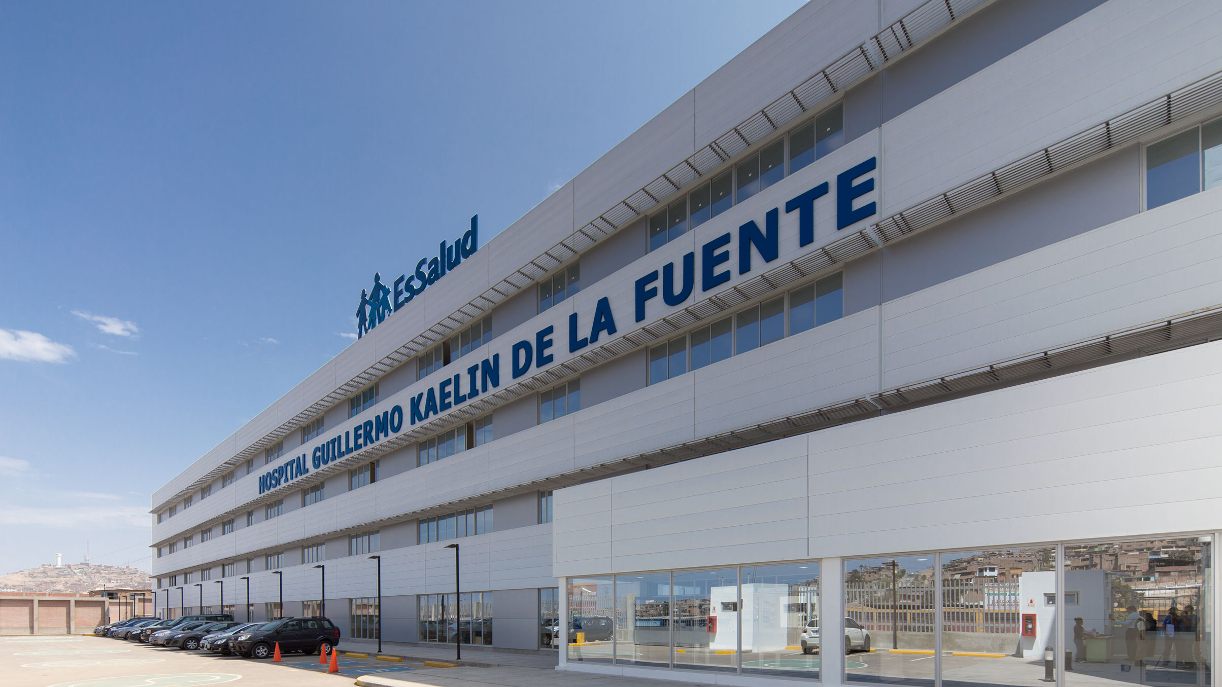 Fachada principal del Hospital Guillermo Kaelin De La Fuente